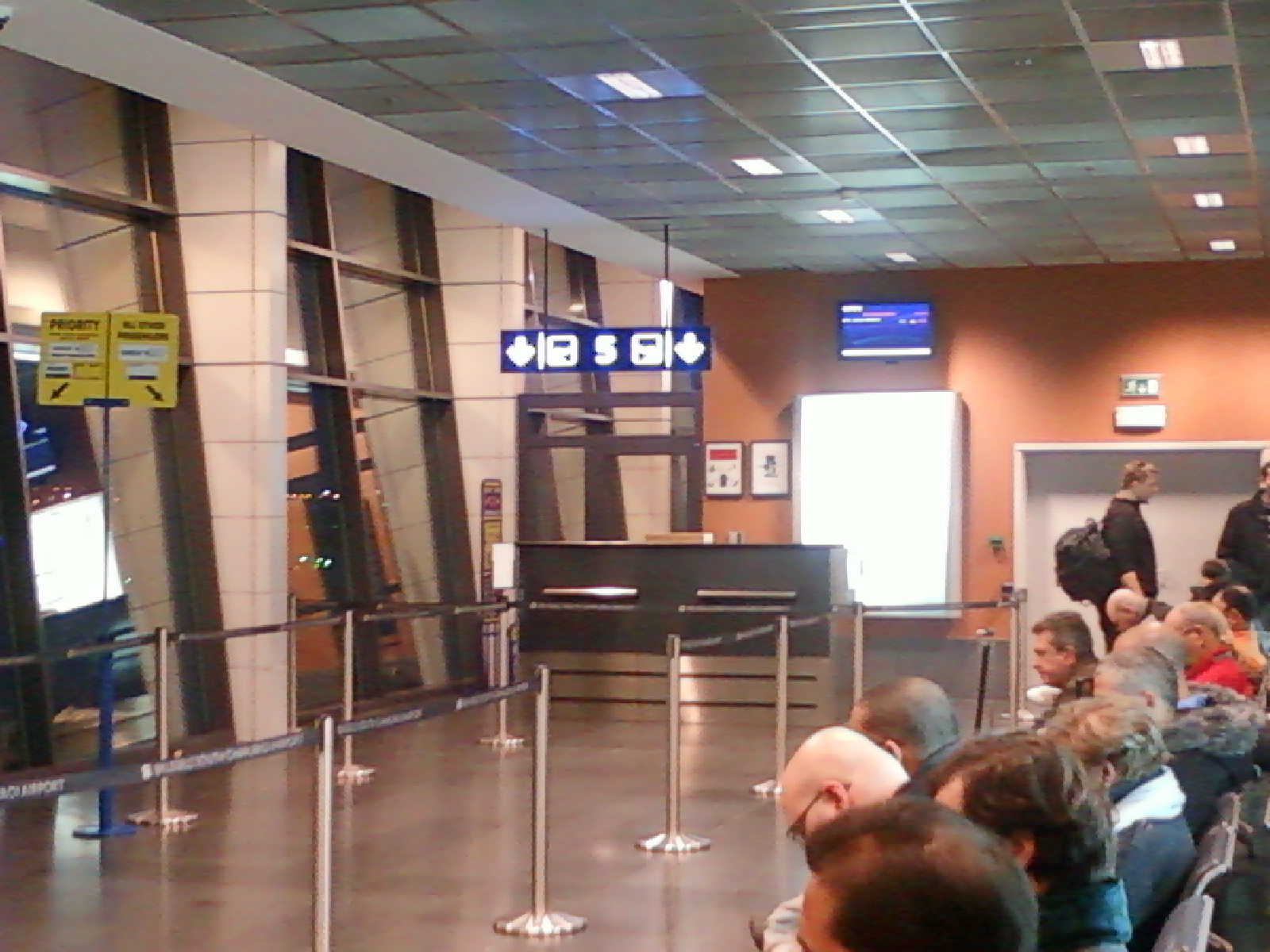 Vue de la porte d'embarquement 5 de l'aéroport de Charleroi Bruxelles-sud